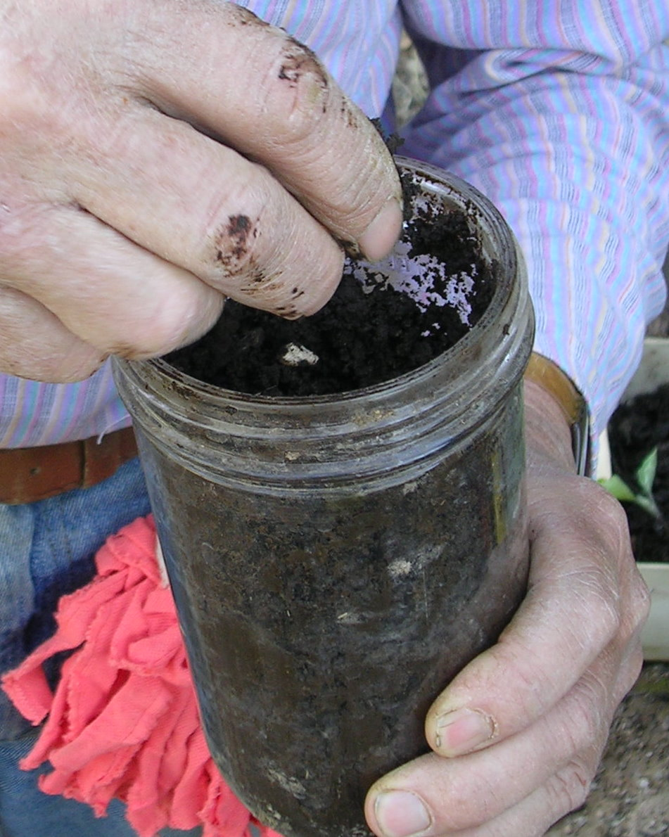 "Bouse de corne" également appelée "préparation 500" utilisée en agriculture biodynamique